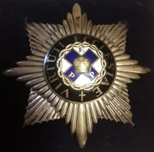 Орден Епископа Платона 1-степени